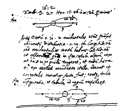 Handschriftliche Aufzeichnung von Neptun